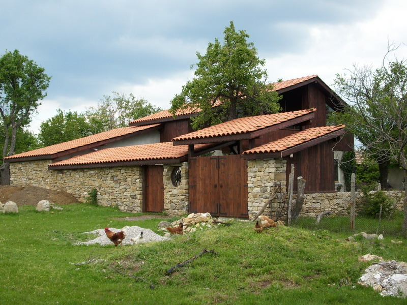 Село Бракница, община Попово - нова къща